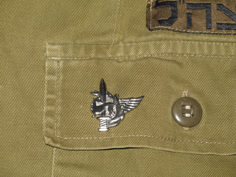 Givati fox on IDF uniform